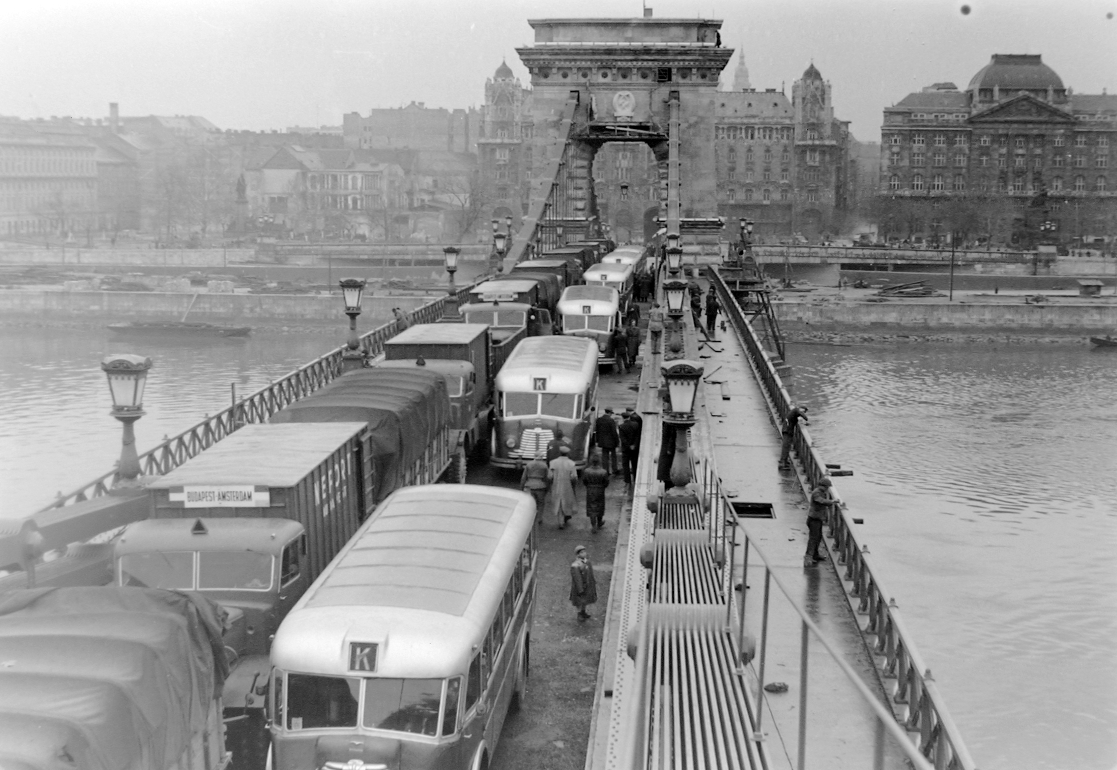 az újjáépített Lánchíd terhelési próbája. Location: Hungary, Budapest Tags: bus, commercial vehicle, MÁVAG-brand, Hungarian brand, bridge, bridge building Title: az újjáépített Lánchíd terhelési próbája.